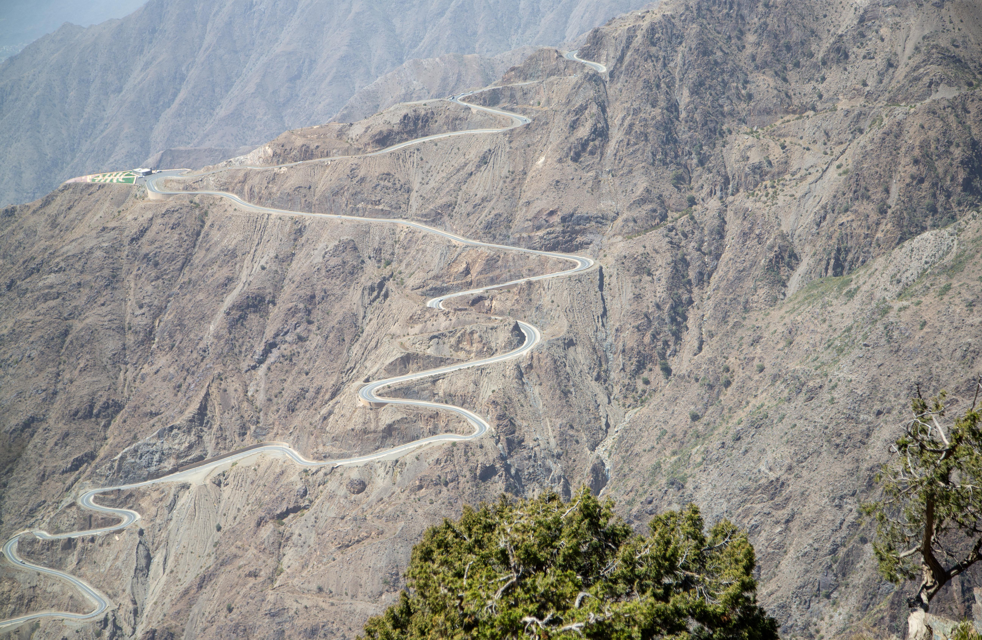 جبال السروات